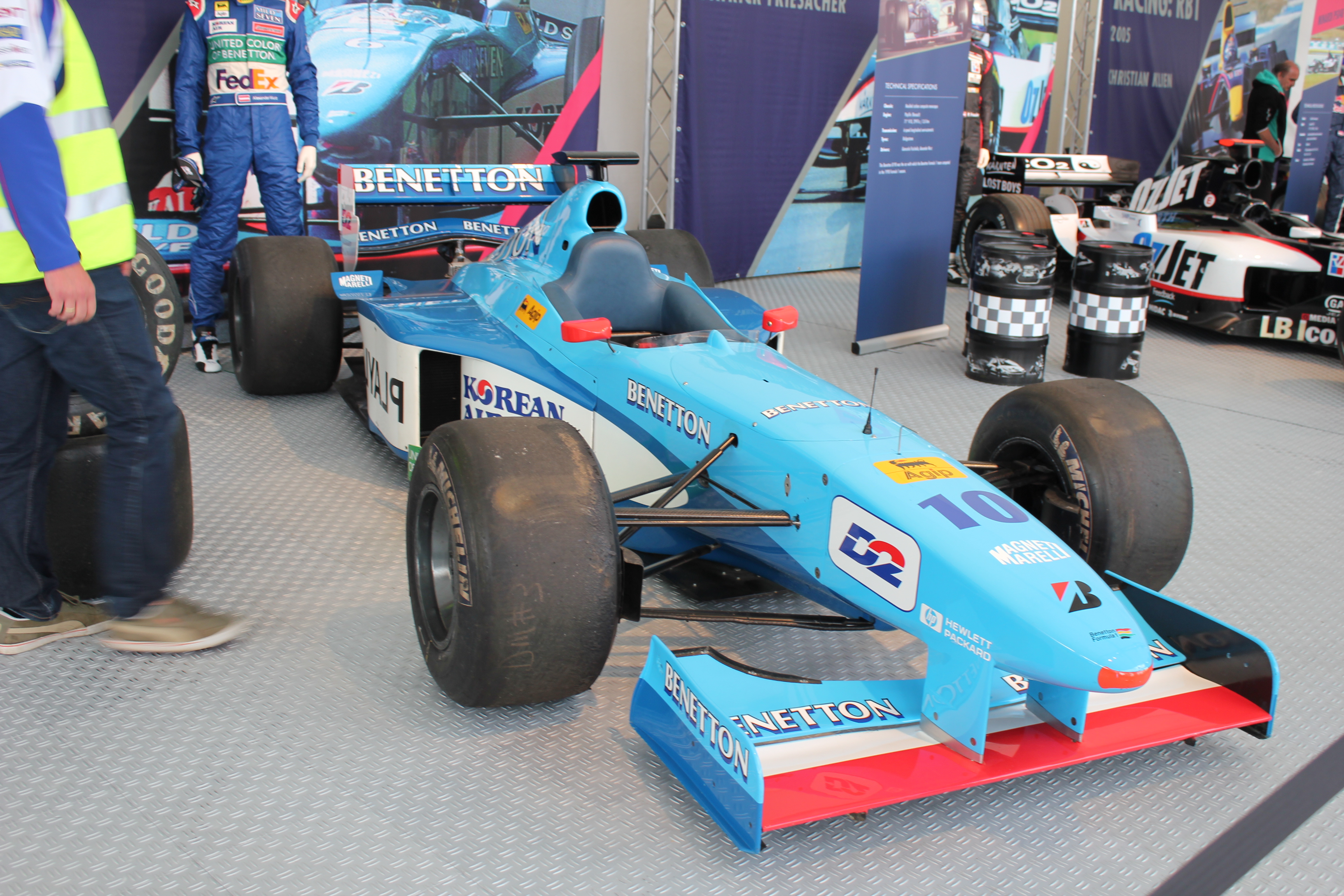 Ein Benetton B198 schräg von vorne